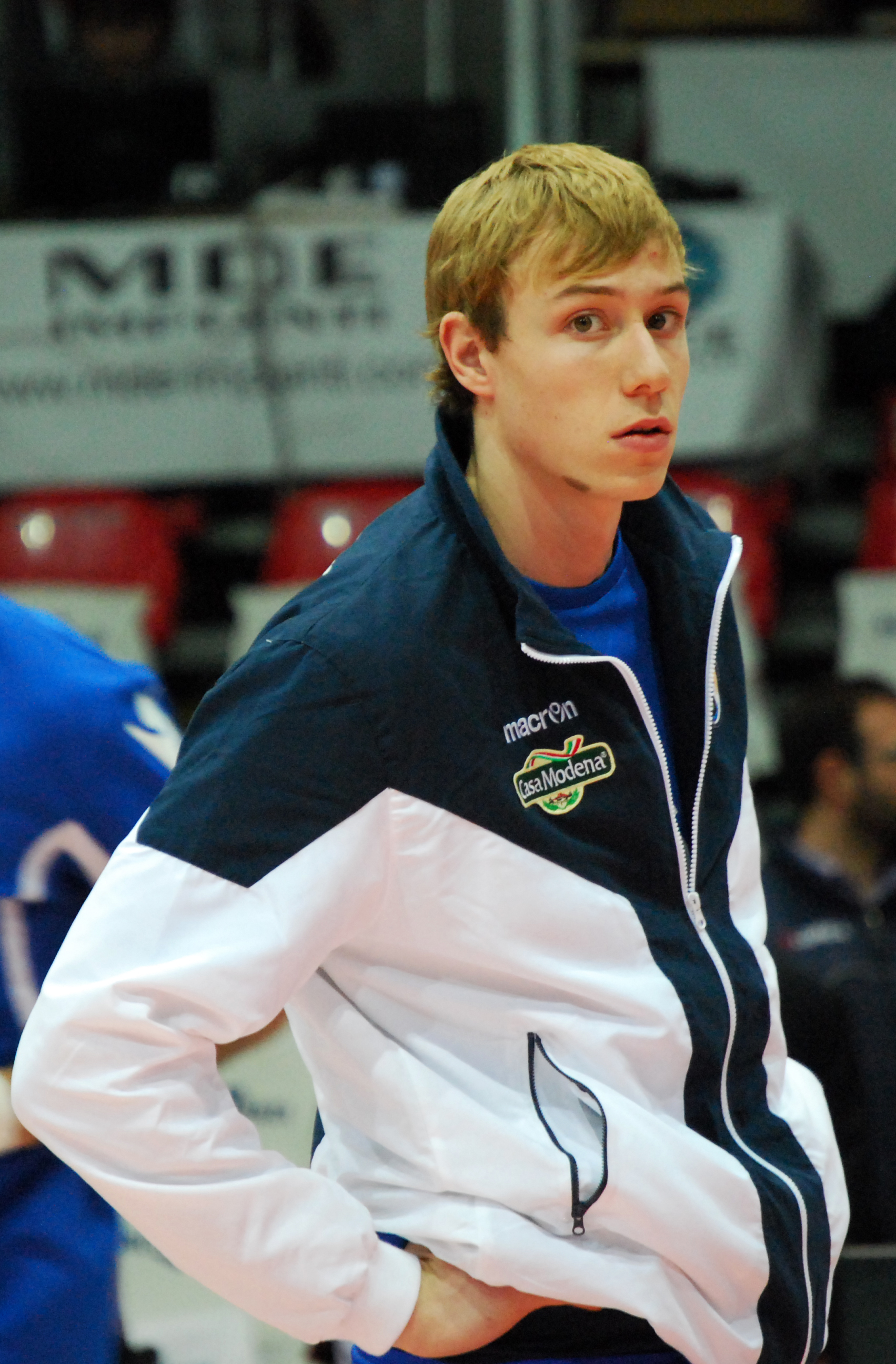 Partita Piacenza-Modena